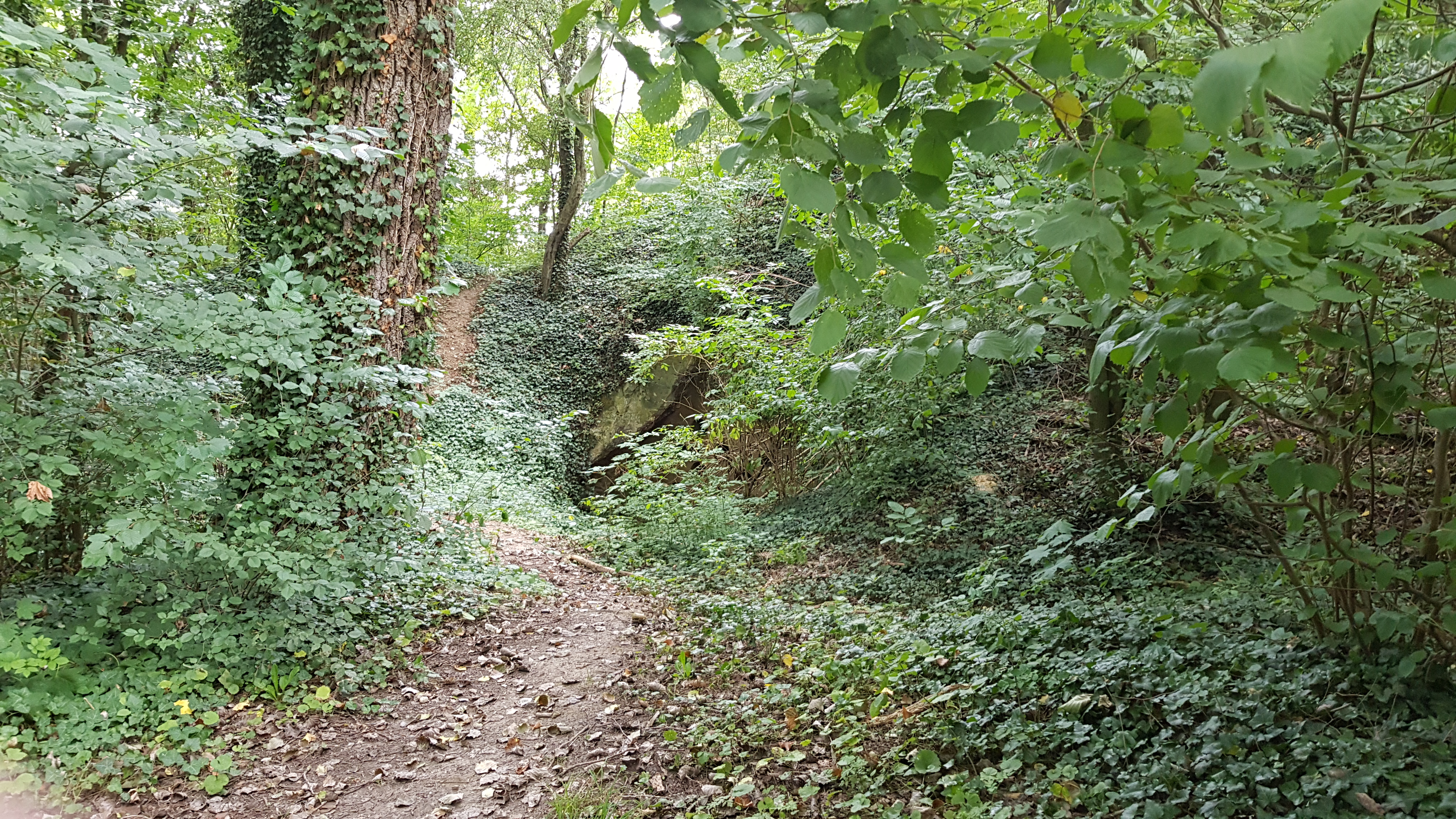 Keerderberggroeve-zuid, Cadier en Keer, Nederland